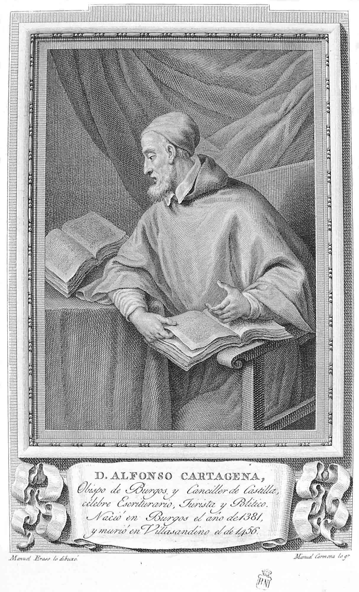 Título:Retrato de Alonso de Cartagena /